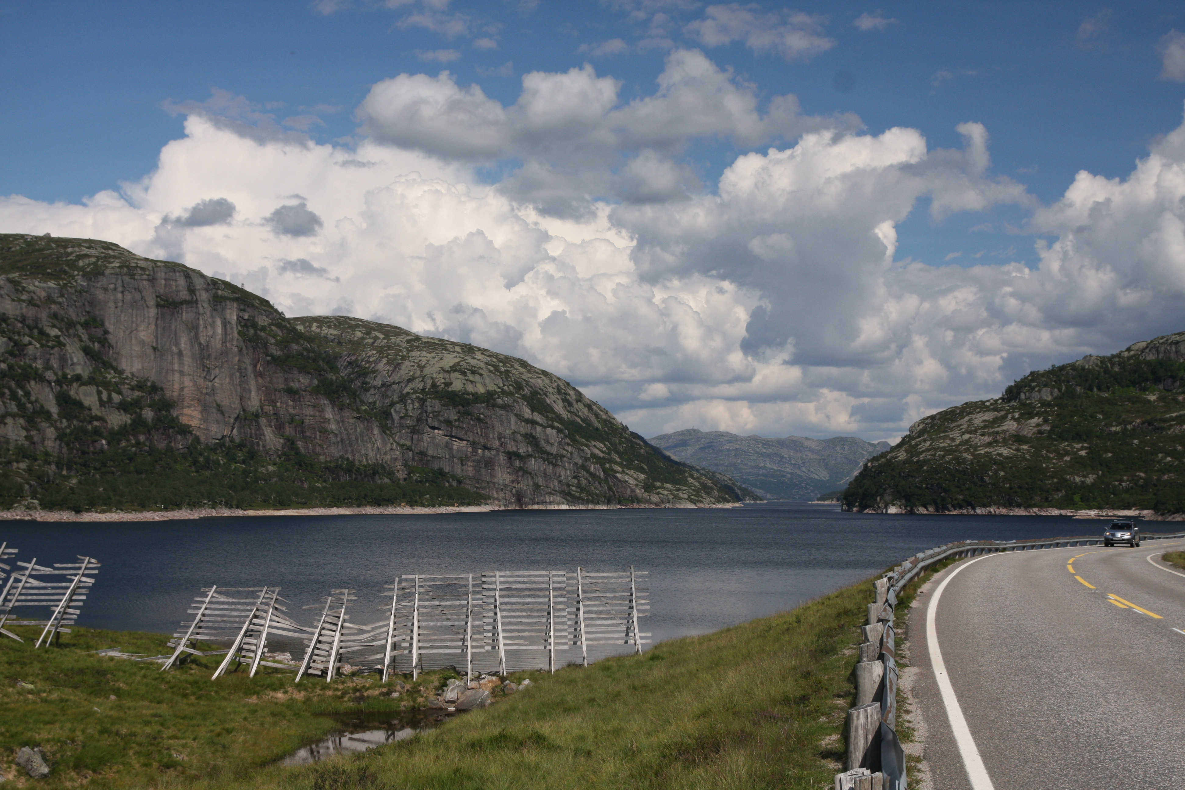 Valevatn i Vest-Agder